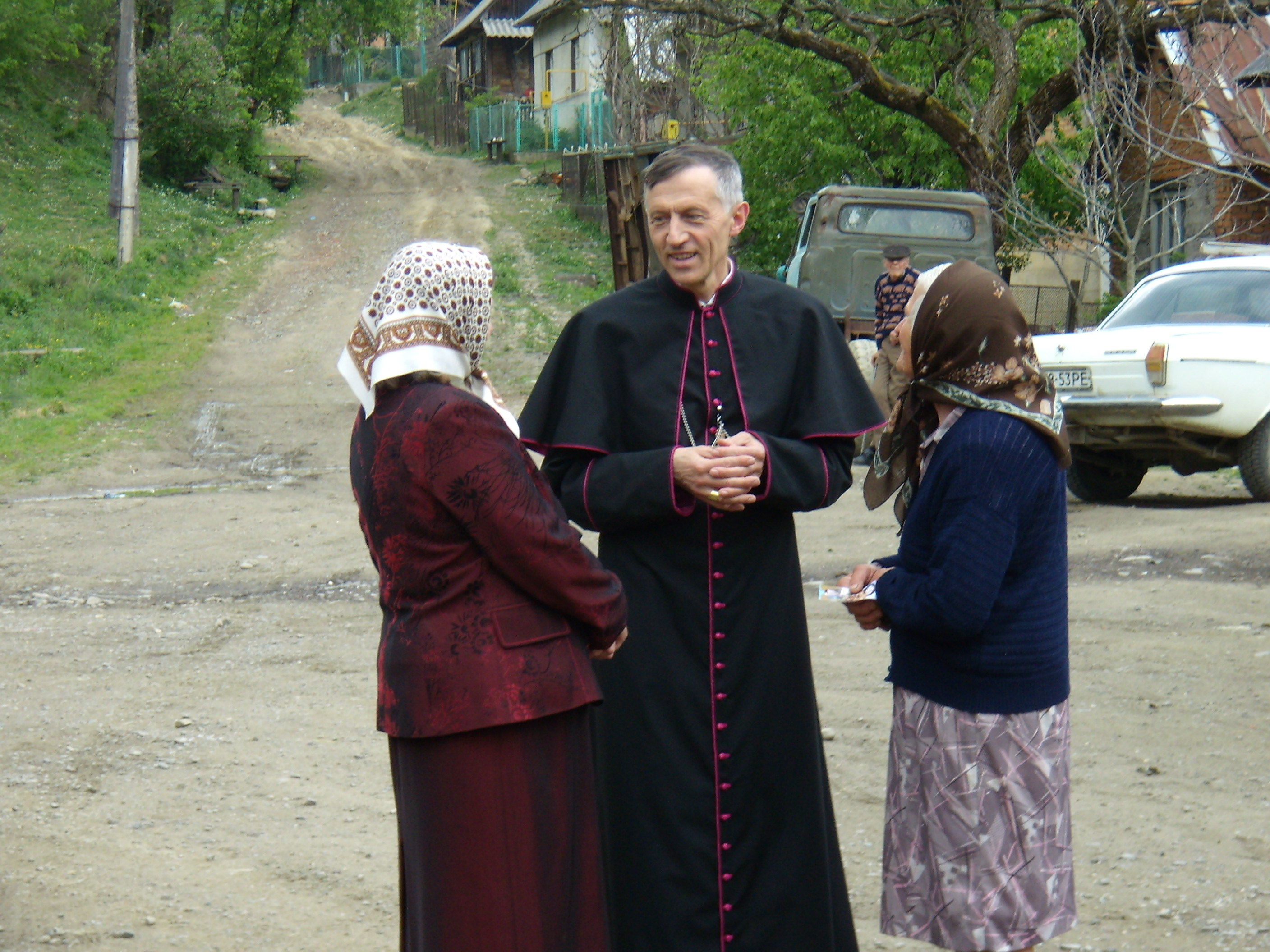 Kerekhegy